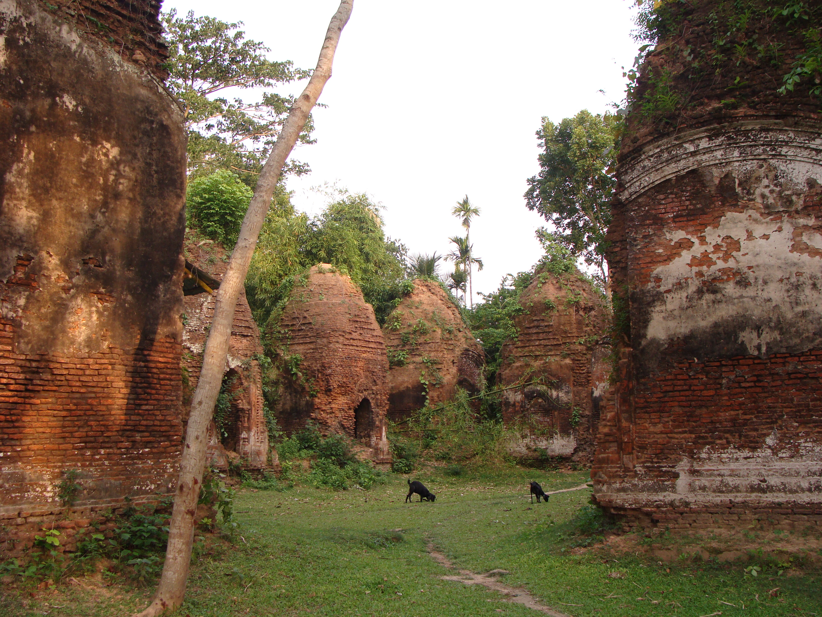 Abhaynagar Upazila, Bangladesh